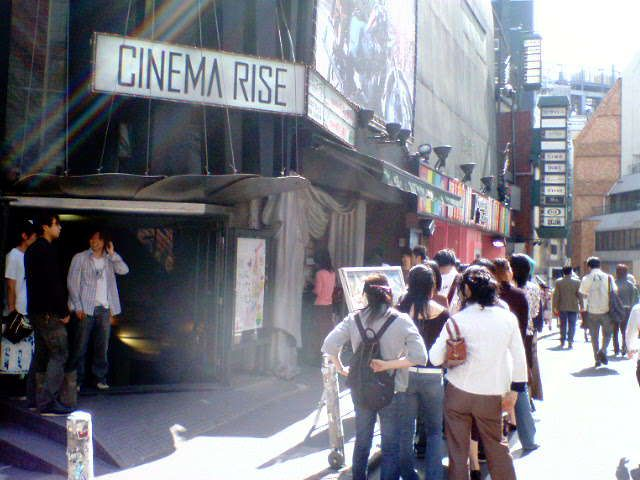 渋谷・シネマライズ 撮影日 2005年5月4日 撮影者 本人